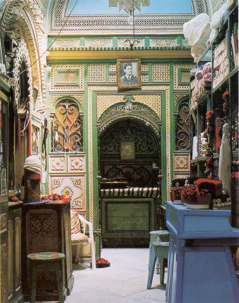 Dans le souk des chéchias, l'atelier d'un artisan Bertrand Bouret